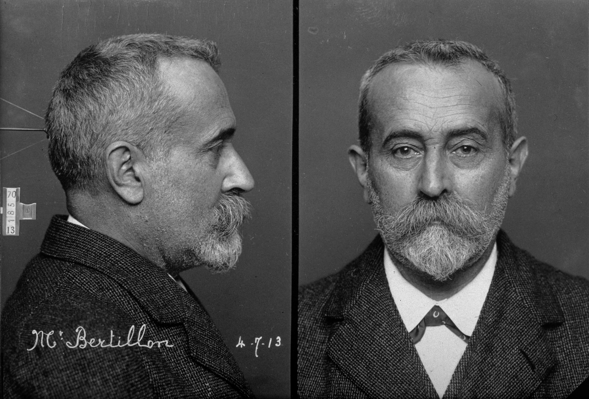 Alphonse Bertillon